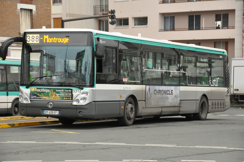 Un Bus Citelis 12M sur la ligne 388.